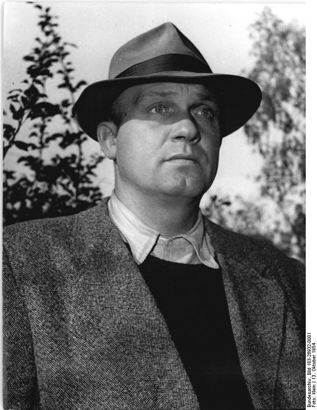 Buch, Einzelbauer ZB-Klein-13.10.1954 Der werktätige Bauer Fritz Thiemes, Berlin Buch sagt zur Volkswahl am 17.10.1954. Dass wir in diesem Jahr unsere Ernte ohne nennenswerte Verluste noch hereingebracht haben, hätte wohl niemand geglaubt. Das war uns aber nur möglich durch die Hilfe der Werktätigen aus der Industrie und Verwaltung sowie der Volkspolizei, bei uns in Buch war es so, dass unser Dreschsatz ständig von Kollegen des Magistrats und von Eisenbahnern besetzt war. Wir Bauern konnten deshalb anderen Arbeiten nachgehen und kamen trotzdem in den Genuss der Frühdruschprämie. Unverständlich ist es mit, dass das Bonner Ernährungsministerium die Vorschläge des westdeutschen Bauernverbandes zur Hilfe für die von der Erntekatastrophe betroffenen Landwirtschaftlichen Gebiete abgelehnt hat. So etwas gibt es bei uns nicht. Unsere Regierung hilft uns, wo es nur geht. Das haben wir werktätigen Einzelbauern bei der Ernteeinbringung deutlich gespürt. Daran werde ich auch denken, wenn ich am 17. Oktober zur Volkswahl gehe." Ausserdem hat der werktätige Bauer Fritz Thiemes anlässlich der Volkswahl sein gesamtes Getreidesoll bereits erfüllt. Ausserdem wird Bauer Fritz Thiemes bis zum 17.10. 100 Ztr. Kartoffeln und 15 Ztr. Schweinefleisch dem freien Verkauf zur Verfügung stellen.